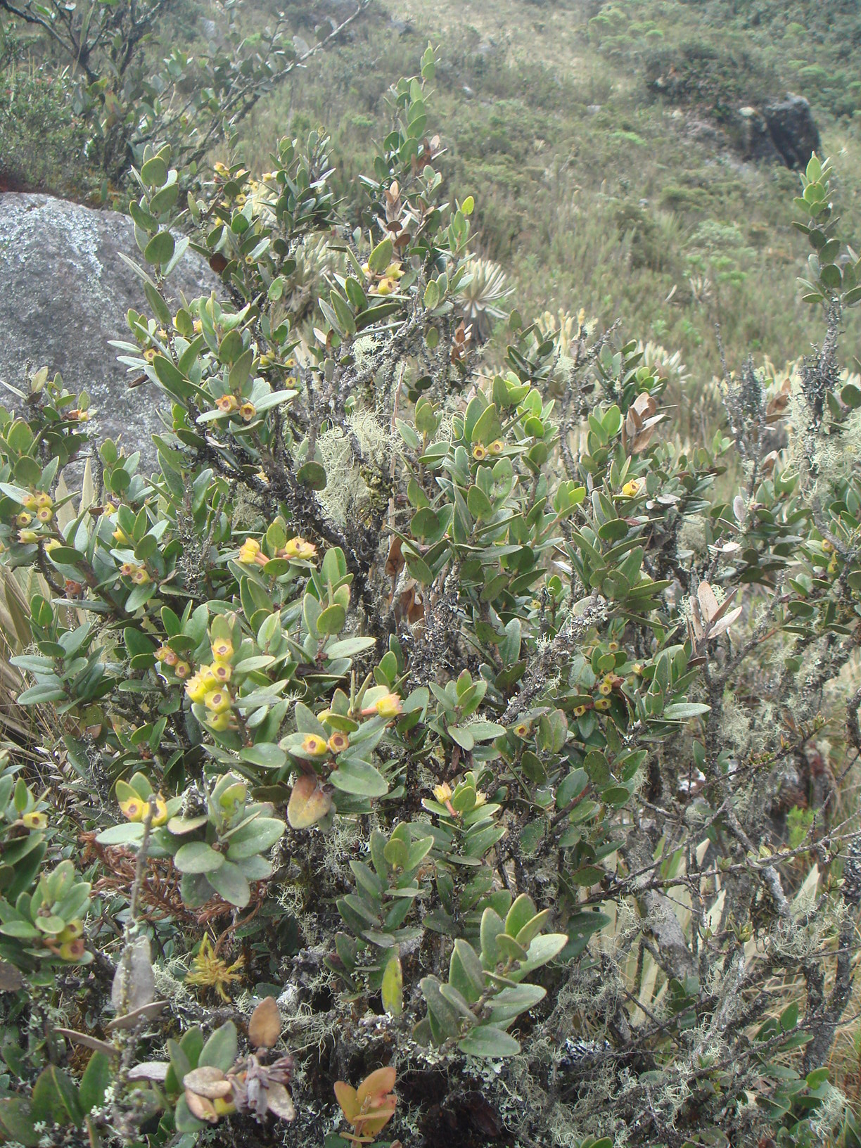 (Disterigma alaternoides) Páramo de Guasca, Cundimanarca, Colombia.